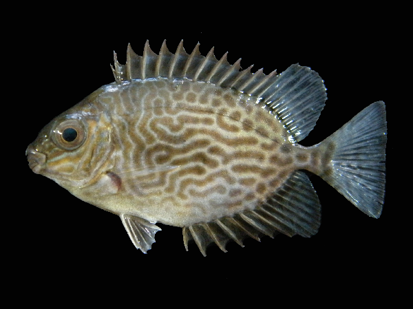 Siganus vermiculatus juvenil en el manglar de Kampuan, en Amphoe Suksamran, Tailandia, 2010, 58.3 mm de longitud